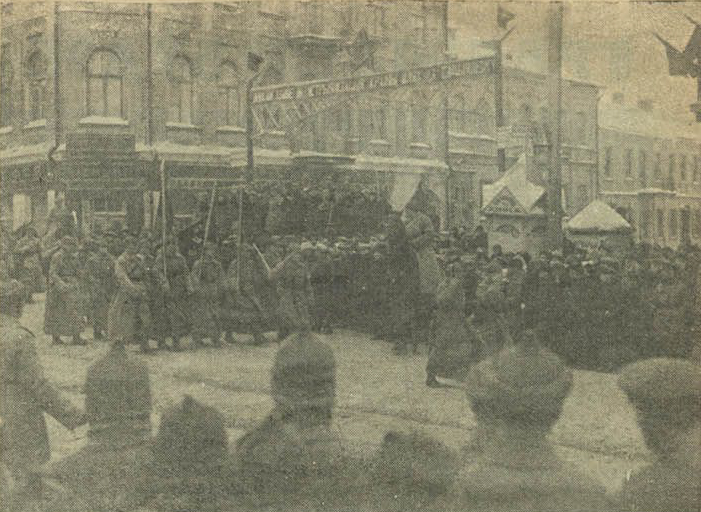 Беларуская (тарашкевіца): Менск (Miensk), рог вуліц Захараўскай (vulica Zacharaŭskaja) і Лошыцкай (vulica Łošyckaja)